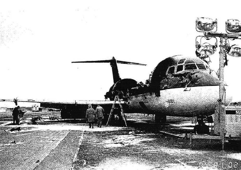 Northwest Airlines Flight 1482（N3313L） wreckage